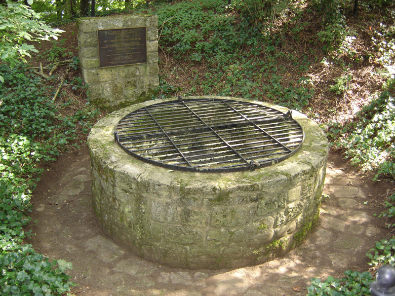 Pëtz vum Zolwerknapp